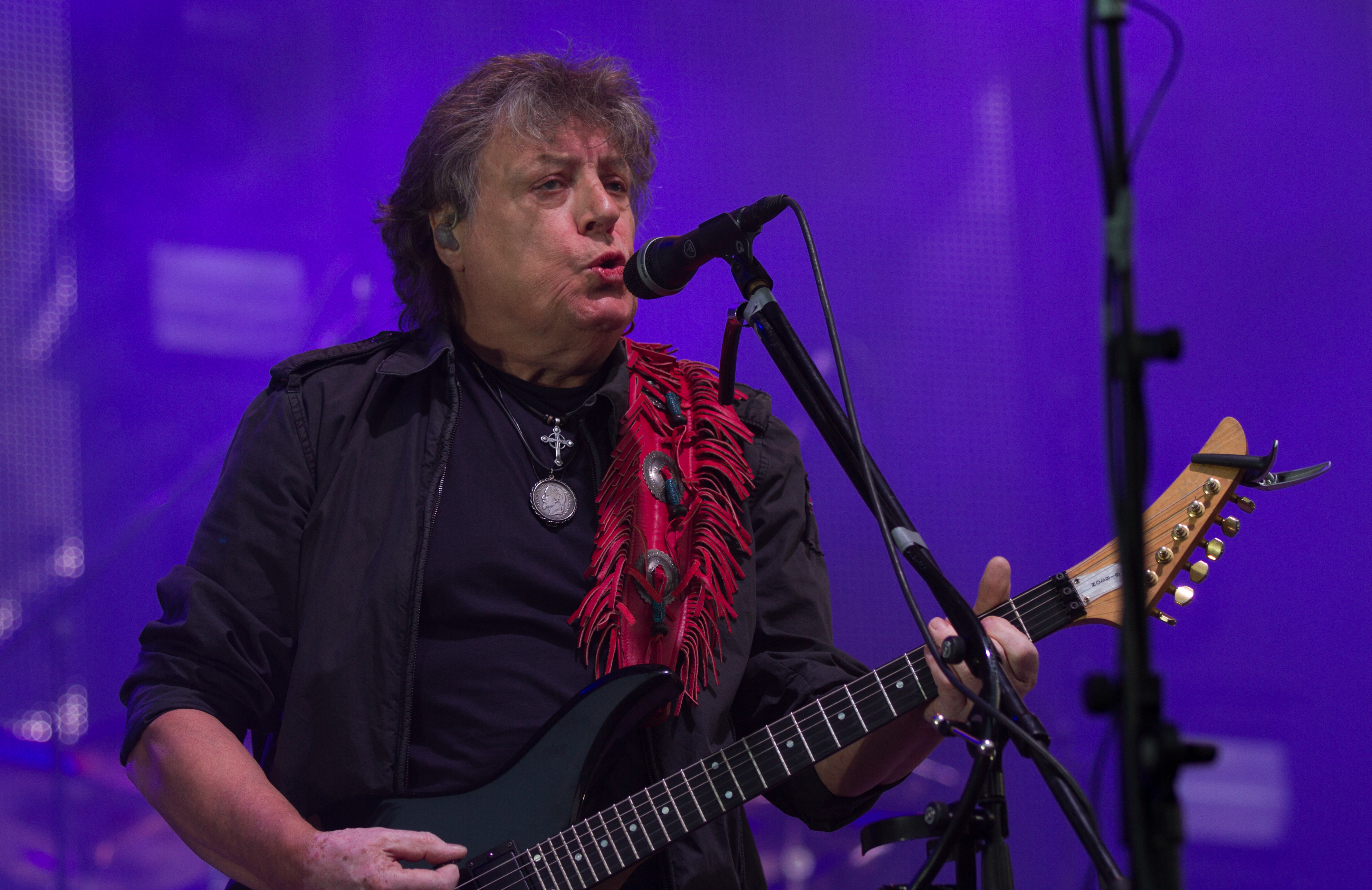 Dieter „Quaster“ Hertrampf beim "Puhdys - Das große Abschiedskonzert 2015" in der Kindl-Bühne Wuhlheide